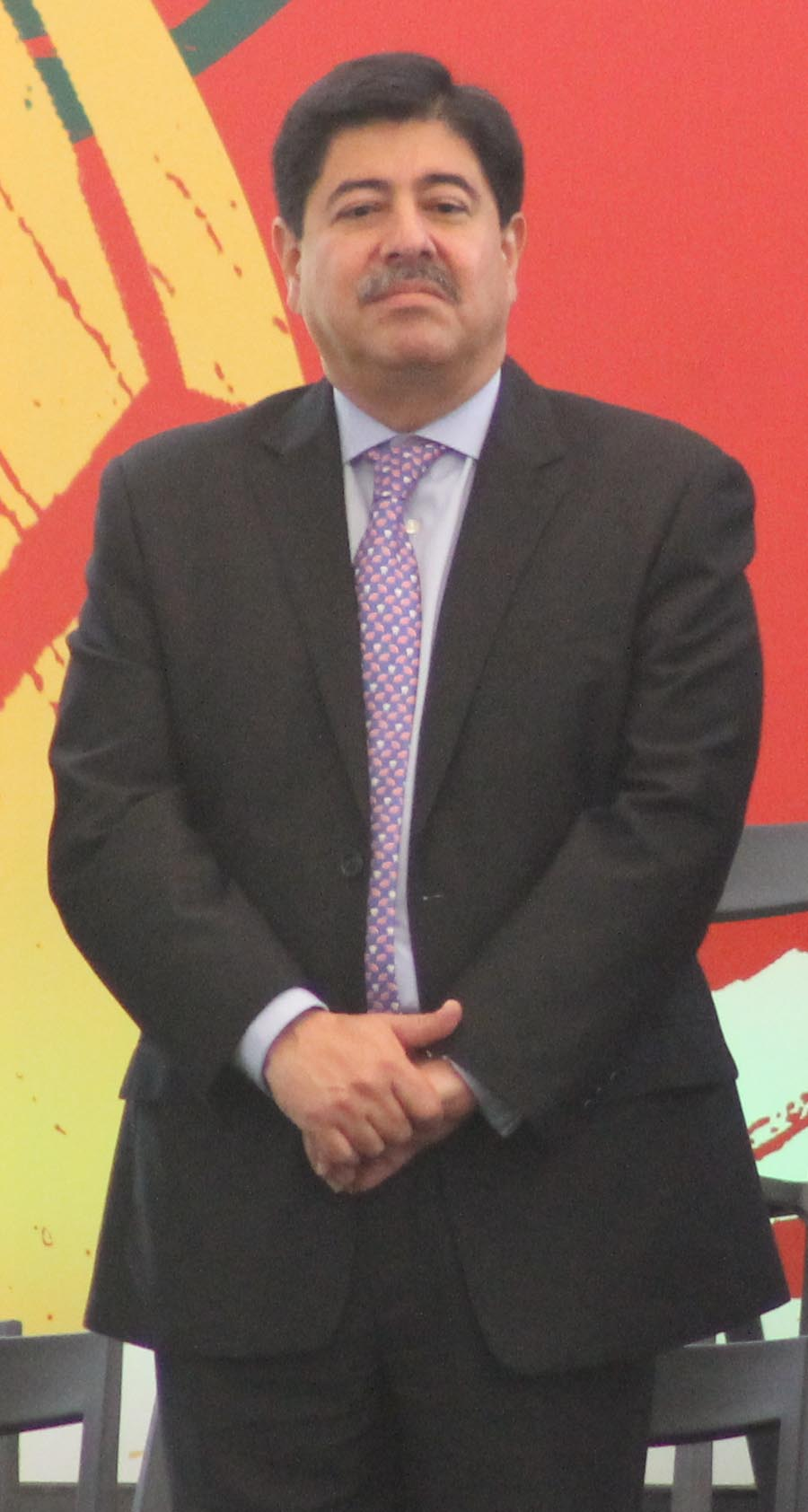 Luis Bedoya, presidente de la Federación Colombiana de Fútbol en 2014.